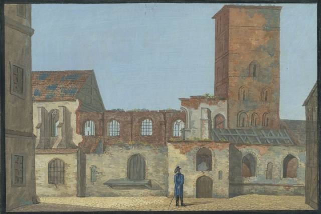 Poznań Collegiate by Alberti